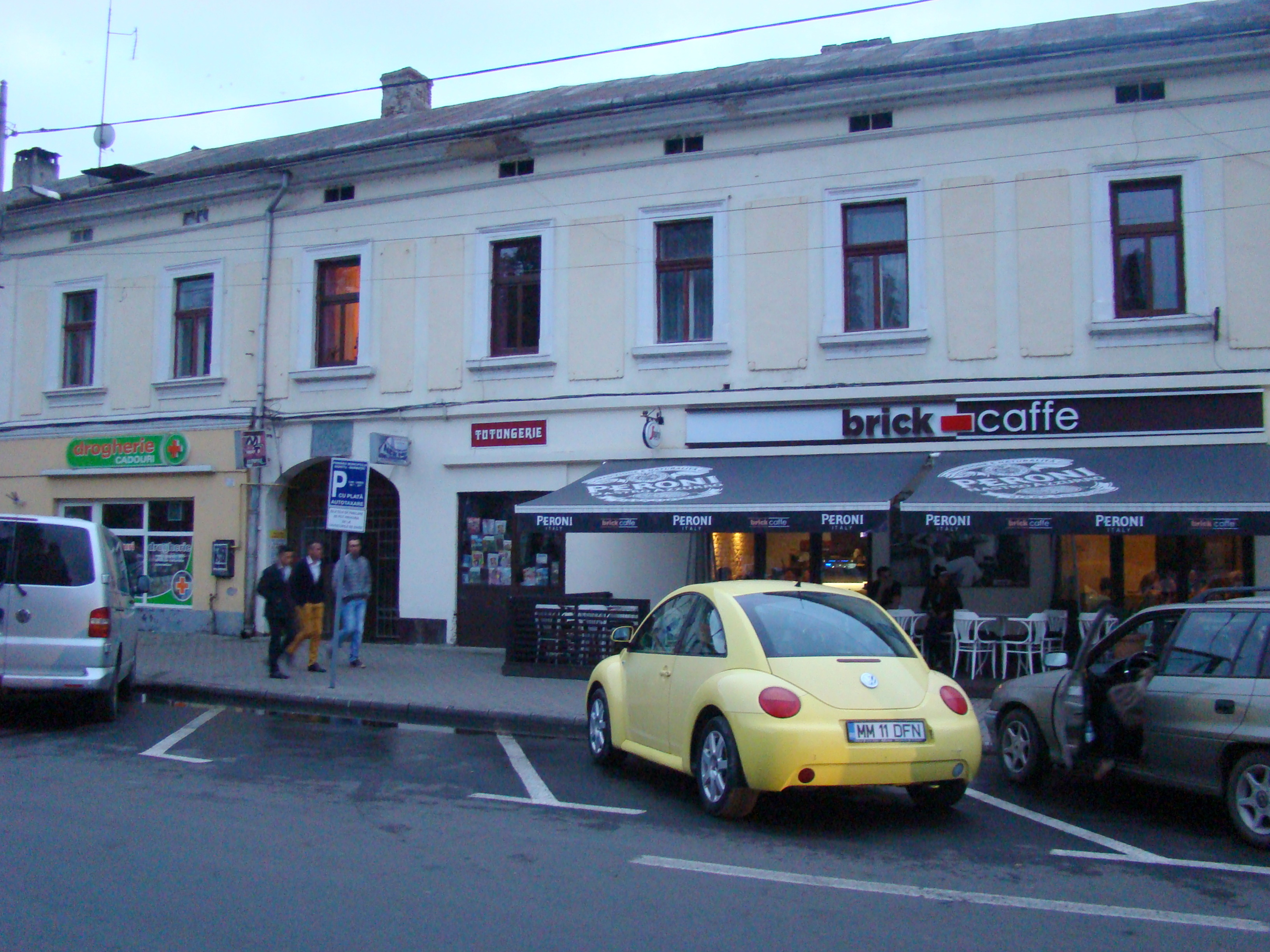 Casa Kahan, municipiul Sighetu Marmației, Piața Libertății 11